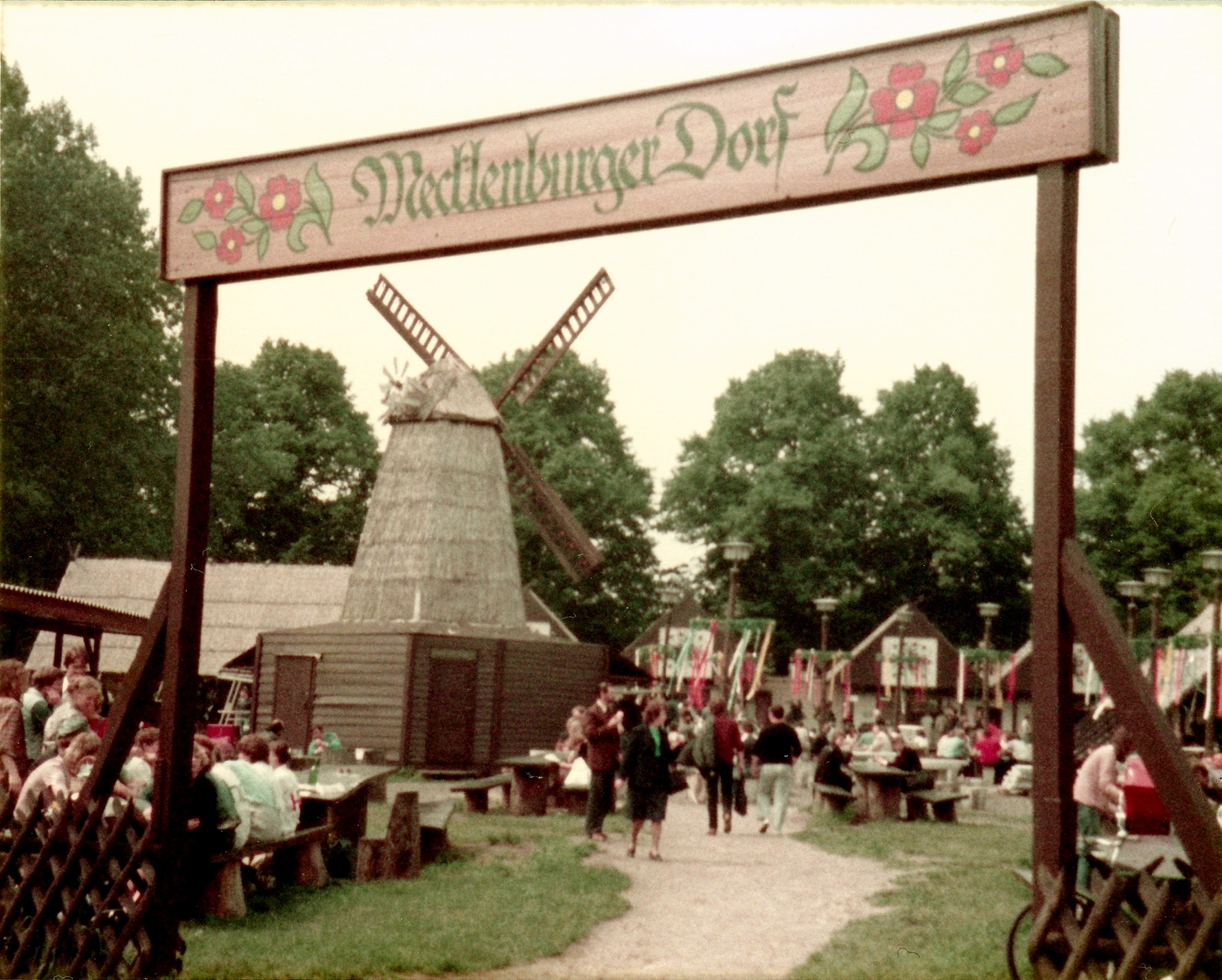 Berlin-Köpenick. Freiluftgaststätte "Mecklenburger Dorf" im Juni 1984. Ort: Parkanlage zwischen dem Ufer der Alten Spree und der Bahnhofstraße (nahe Platz des 23. April).